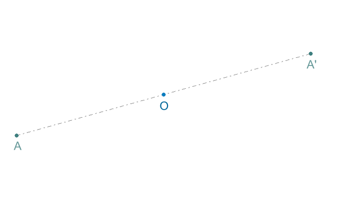 Simetría central, isometría, transformaciones isométricas, geometry